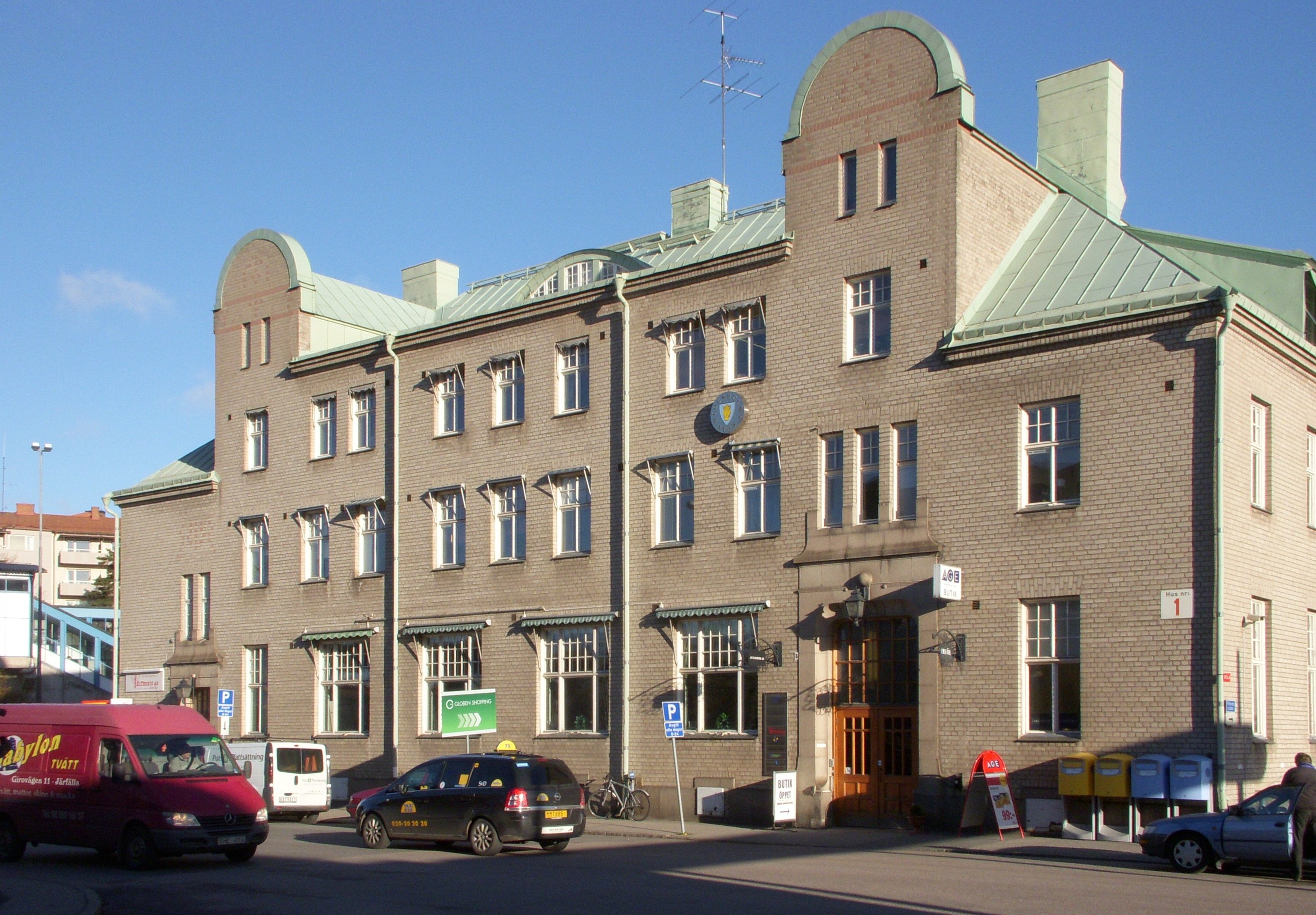 Slakthusområdet, Slakthusplan 3